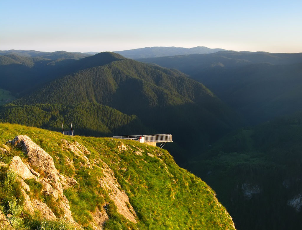 Платформата "Орлово око"